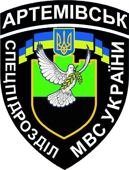 Емблема батальйону патрульної служби міліції особливого призначення МВС України «Артемівськ». Створений 8 травня 2014 чисельністю в 200 осіб, командир — майор міліції Костянтин Матейченко.